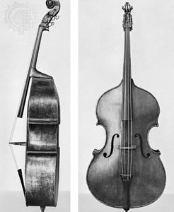 El tololoche de México, un instrumento musical